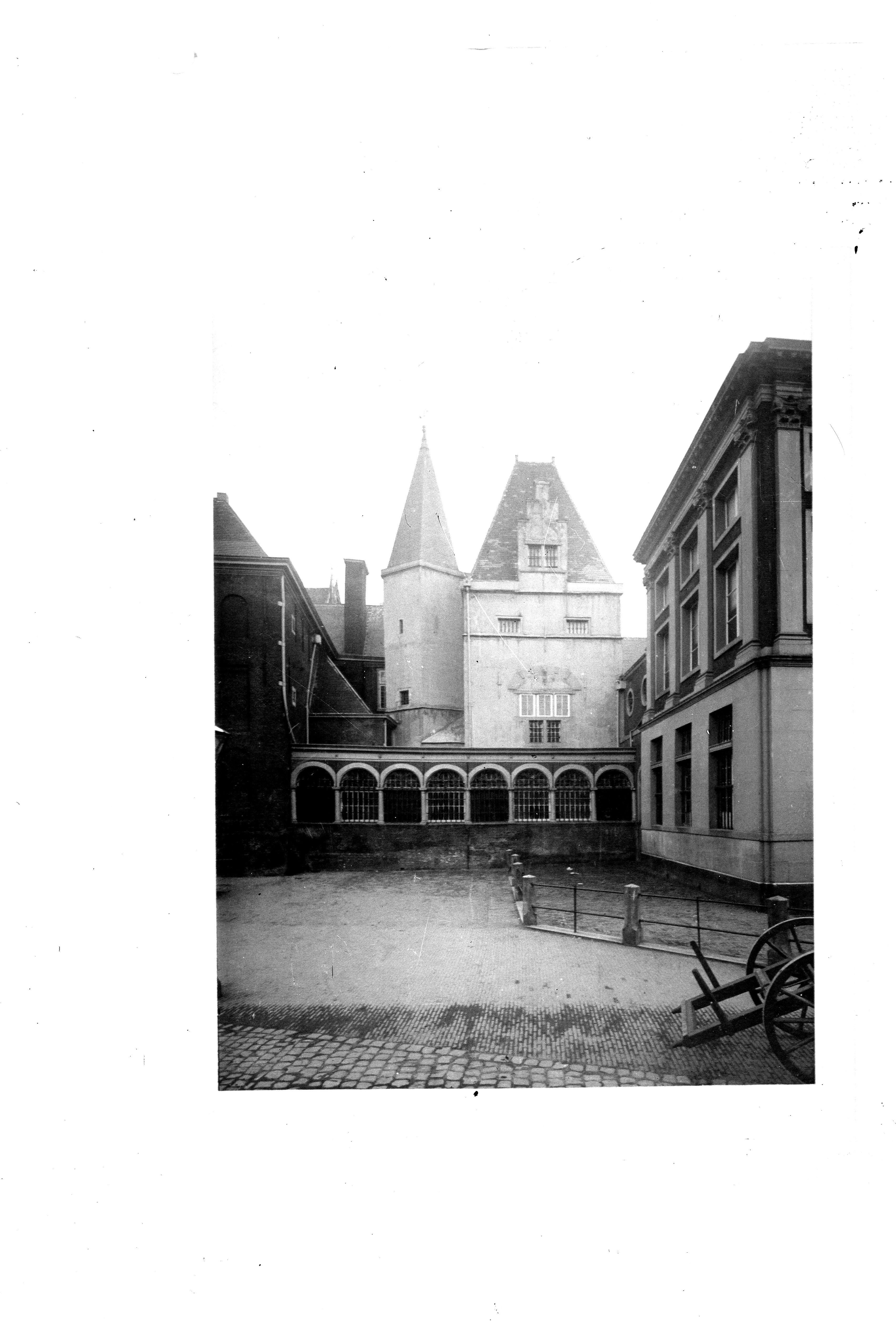 Gezicht op 's-Gravenstein / Gravensteen aan het Gerecht.